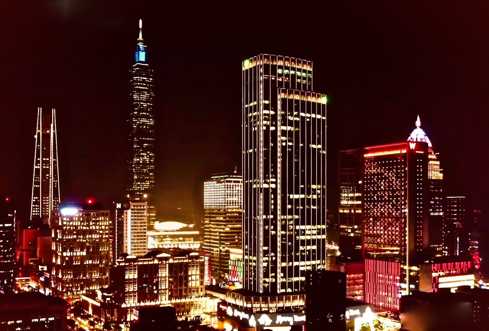 台北信義區摩天大樓空拍